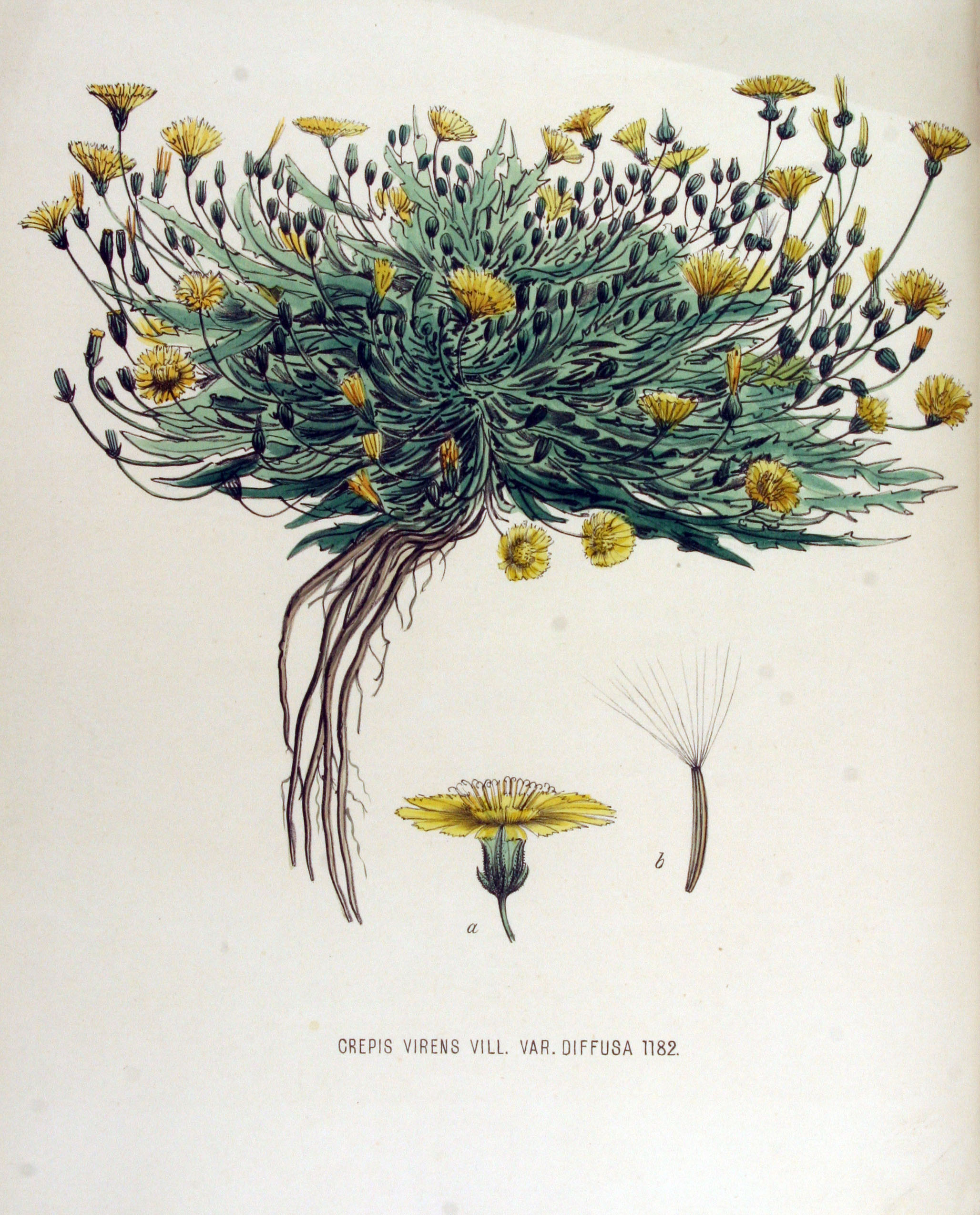 Crepis capillaris (L.) Wallr. (Syn. Crepis virens L., Crepis virens Vill. var. diffusa DC.)